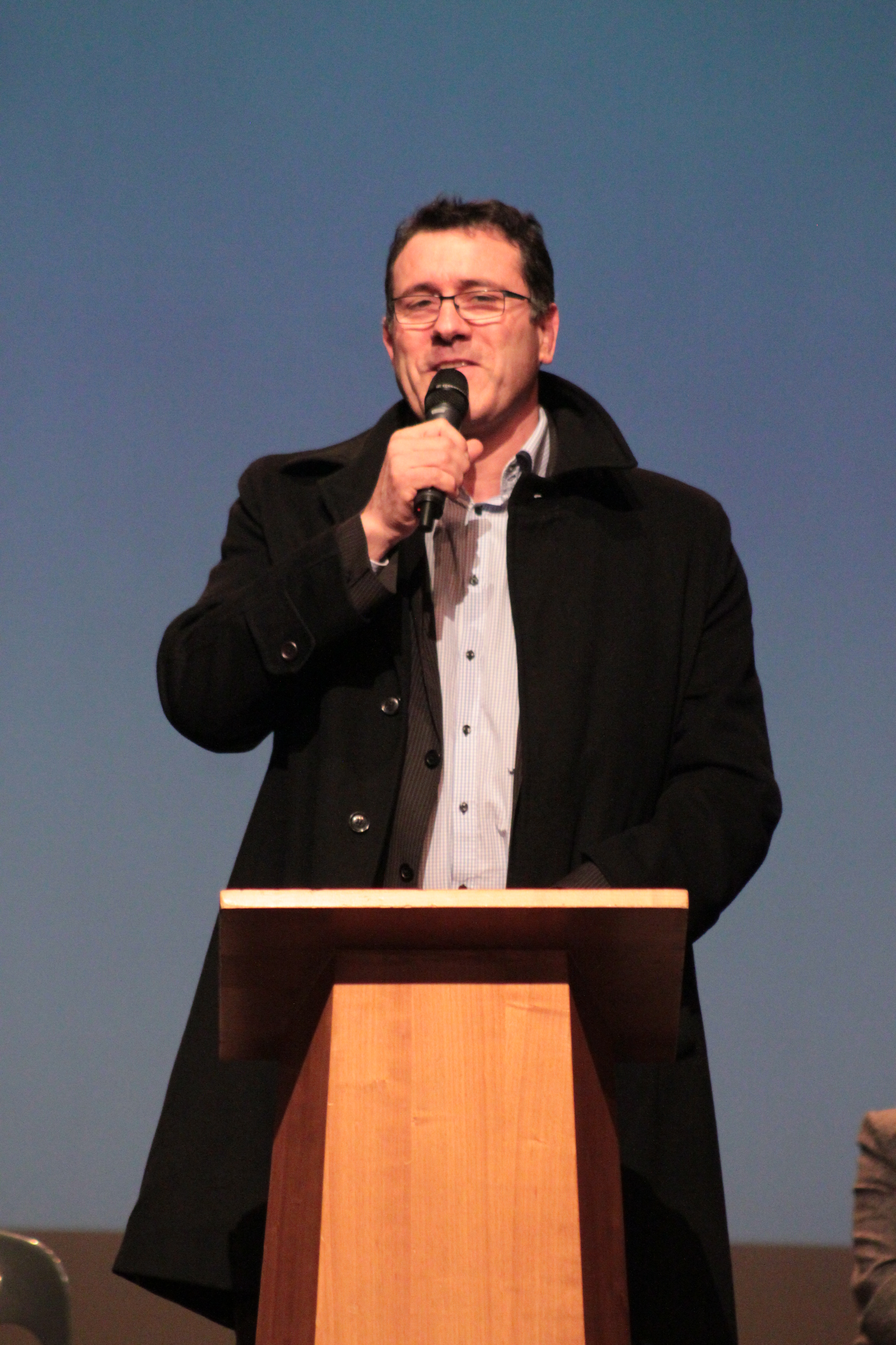 Stéphane Traineau, parrain de "Bouge avec moi", à l'inauguration de la 66° édition de la foire exposition ExpoVall' 2014, Fr-44-Vallet.